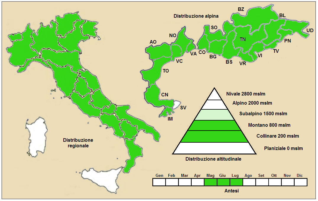 Actaea spicata - Distribuzione